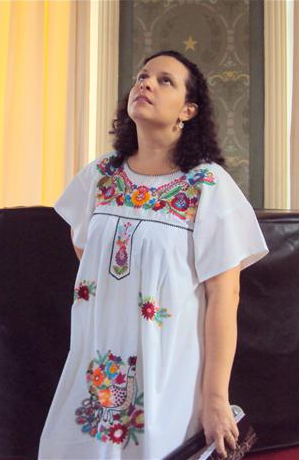 Escritora Socorro Acioli no lançamento do livro "A Bailarina Fantasma" no foyer do Theatro José de Alencar.